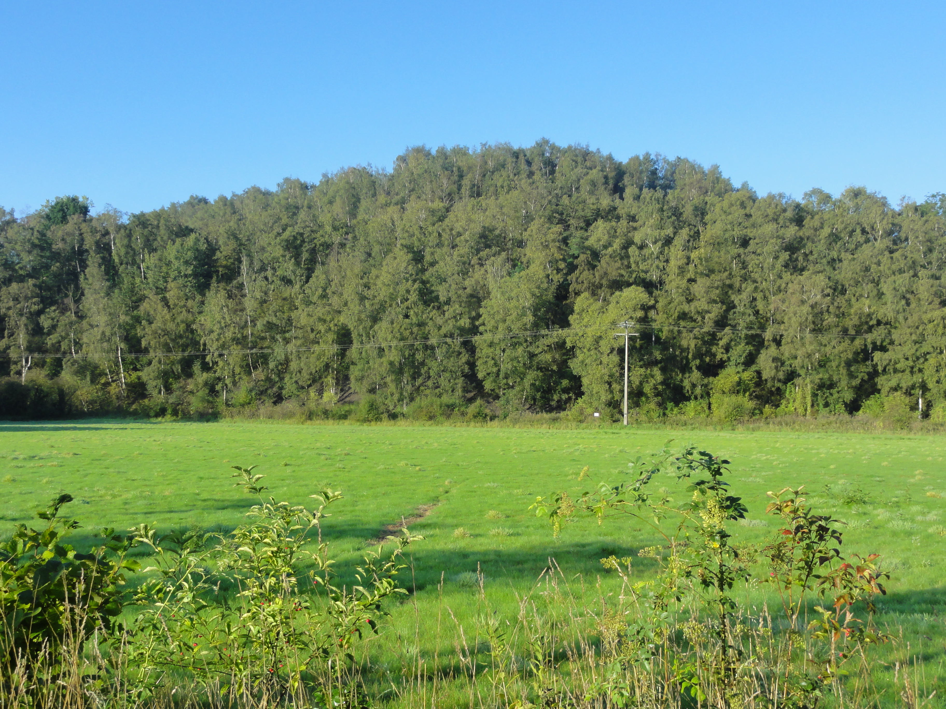 Terrils nos 123 et 141 respectivement dénommés Escarpelle ancien plat et 1 Nouveau Est, Fosse n° 1 de la Compagnie des mines de l'Escarpelle, Roost-Warendin, Nord, Nord-Pas-de-Calais, France. Le terril conique n° 141 a été créé par dessus le terril plat n° 123, à ce titre, ils sont indissociables.